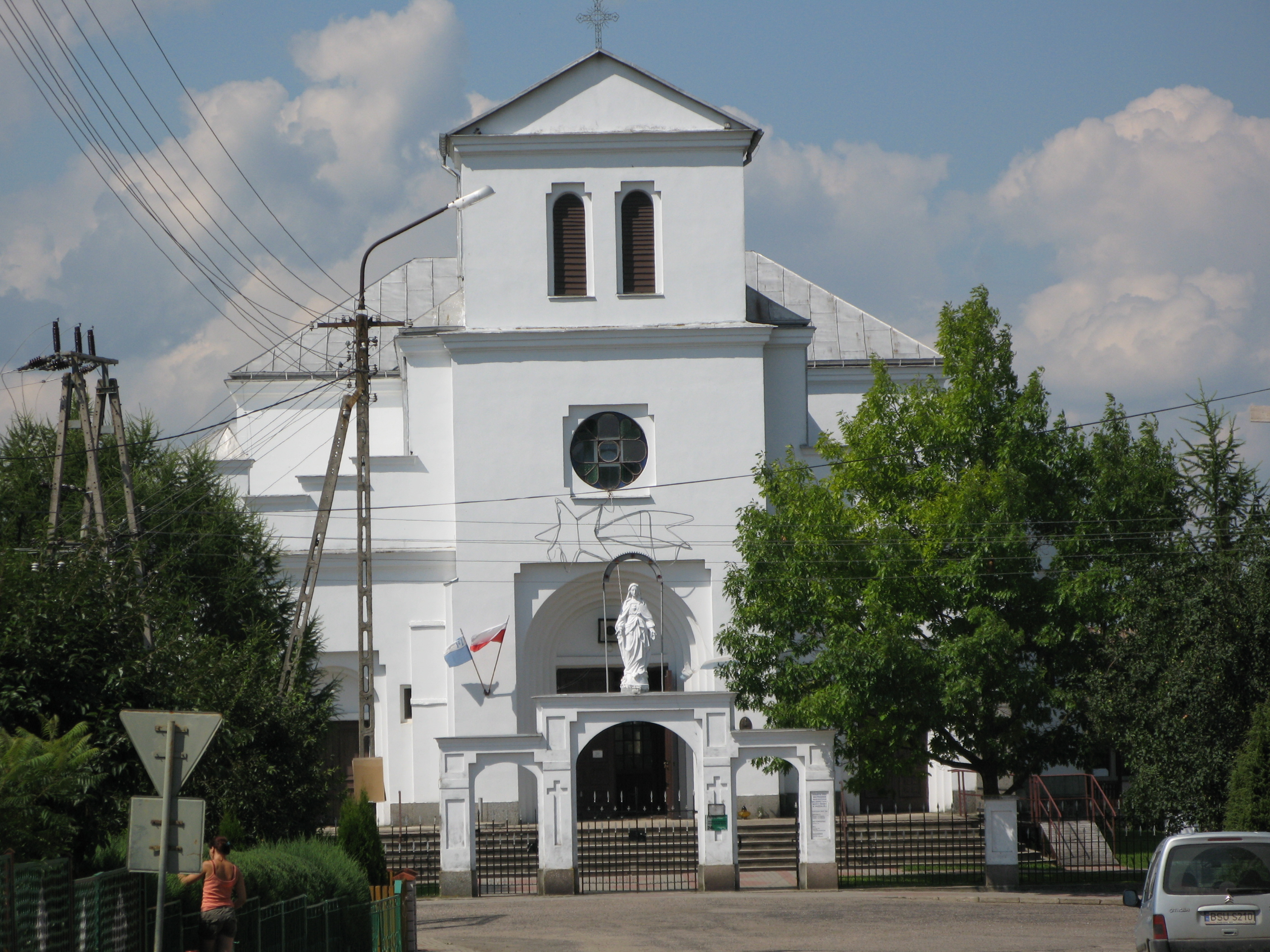 Przerośl - rzymskokatolicki kościół parafialny p.w. Narodzenia Najświętszej Maryi Panny Catholic church in Przerosl, Poland, region fo Suwalki